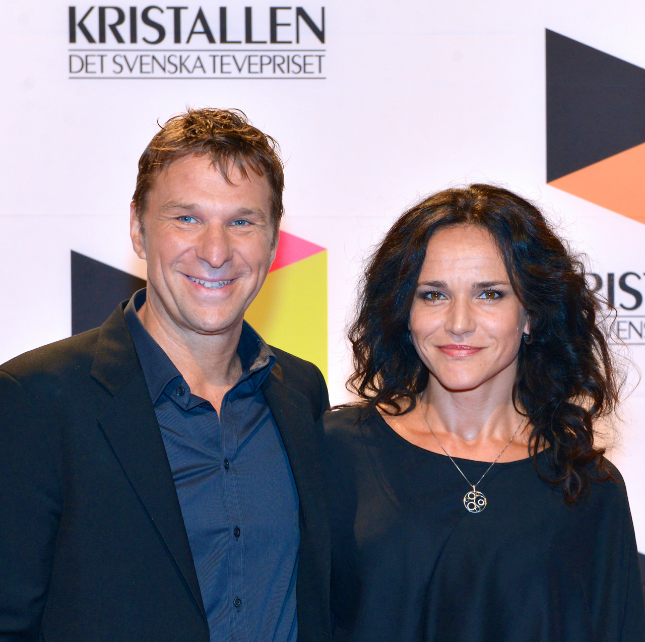 Anders Lundin och Kerstin Ryhed Lundin på Kristallen-galan den 30 augusti 2013.